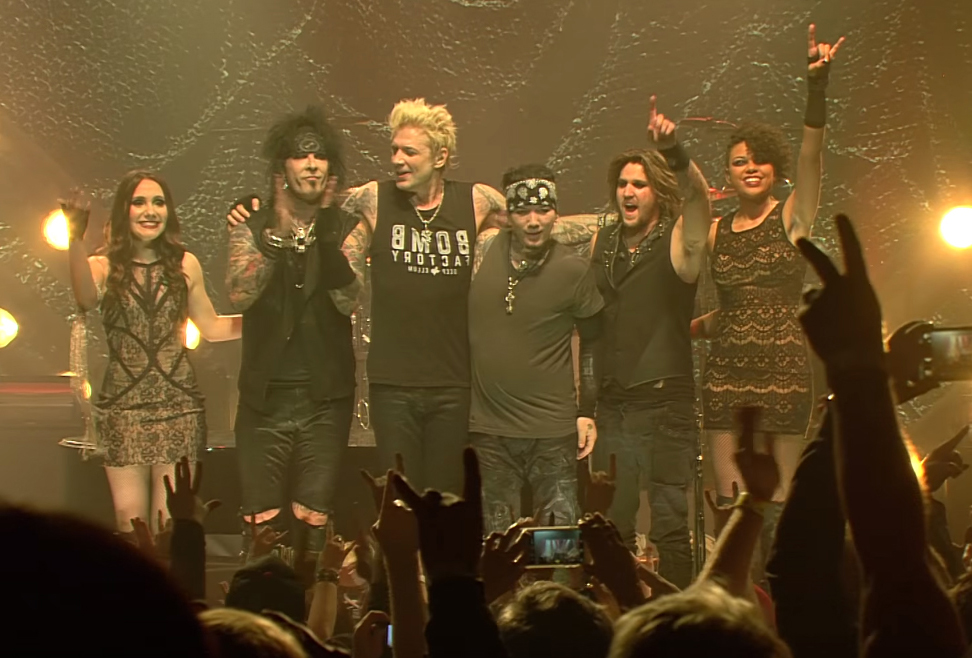 Un fotogramma del concerto dei Sixx:A.M tenutosi al The Vic Theatre nel 2015